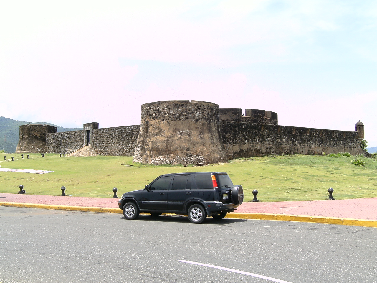 Foto de la fortaleza san Felipe en el Malecón